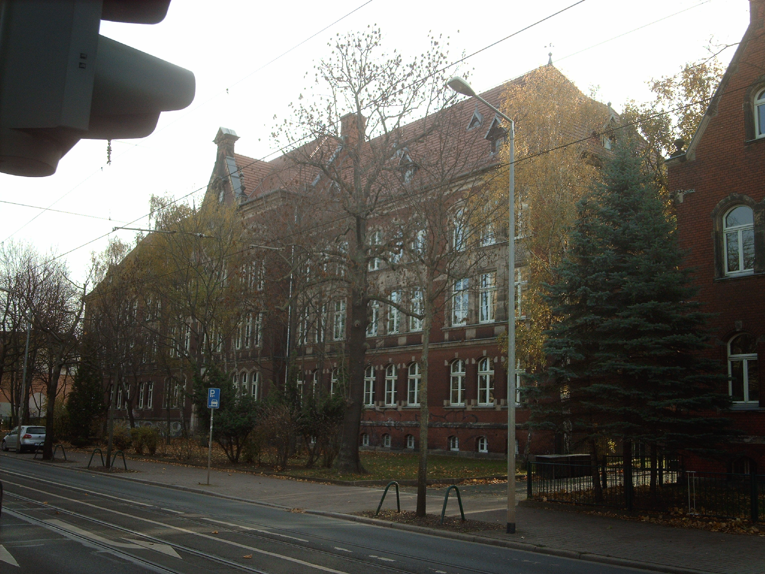 Friedrich-Schiller-Gemeinschaftsschule/Regelschule 14 in der Schillerstraße 33 in Erfurt, erbaut als Königliches Gymnasium.